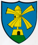 Wappen von Montmollin Kanton Neuenburg Schweiz